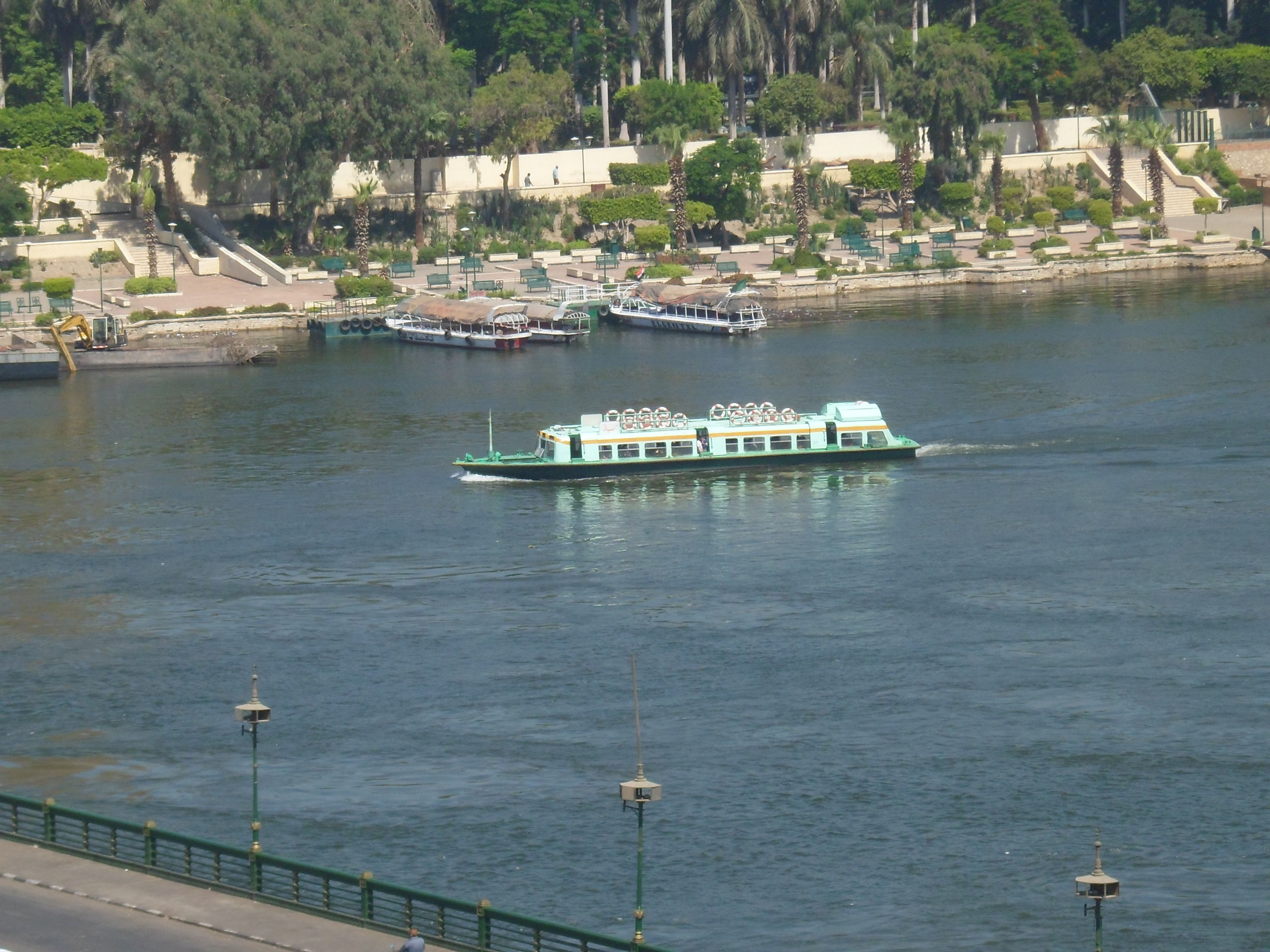 الاتوبيس النهري، القاهرة